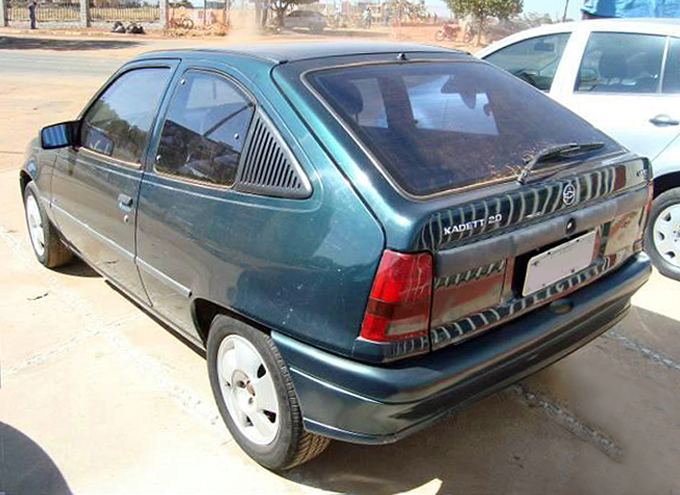 Chevrolet Kadett GL 2.0 3dr, facelifted later version (Brazil)